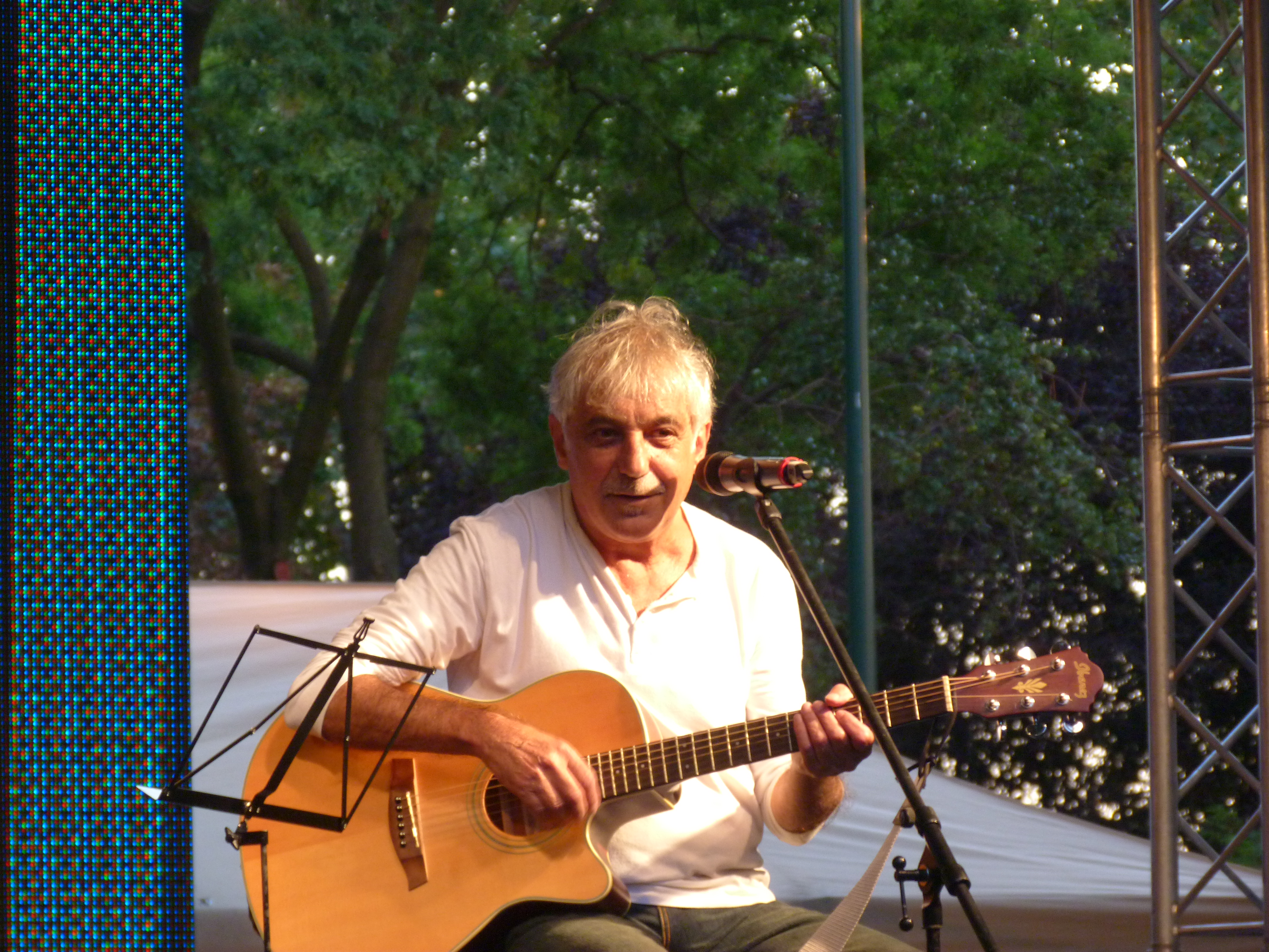 A felvétel 2013. augusztus 31 -én szombaton készült Budapesten, a Pozsonyi utcában, 5. Pozsonyi Piknik. Heilig Gábor. ©© Derzsi Elekes Andor, Budapest, 2013, You are authorised to use these photos and vids under Creative Commons – even for commercial, for profit purposes. Photos must be attributed to Derzsi Elekes Andor. All of the photos and vids in the Metapolisz DVD line are under Creative Commons and can be used even for commercial – for profit – purposes. Recommended Citation Derzsi Elekes Andor: Metapolisz DVD line